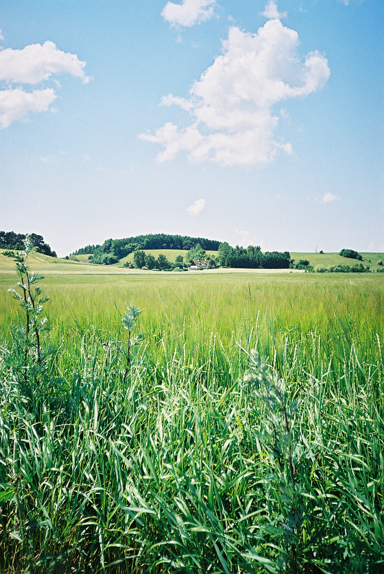 Skåret i Strø Bjerge